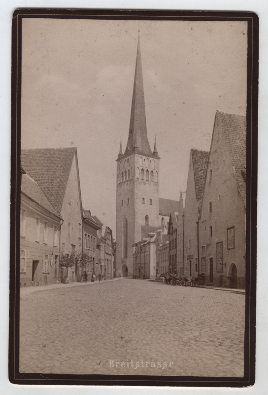 Lai tänav Oleviste kirikuga, vaadatuna Suurtüki tänava ligidalt